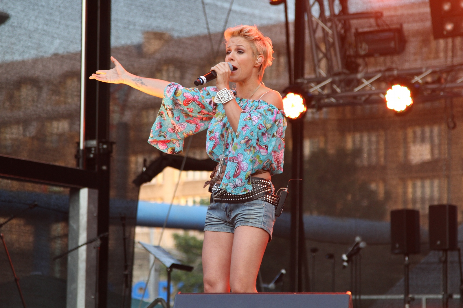 Michelle im Juli 2011